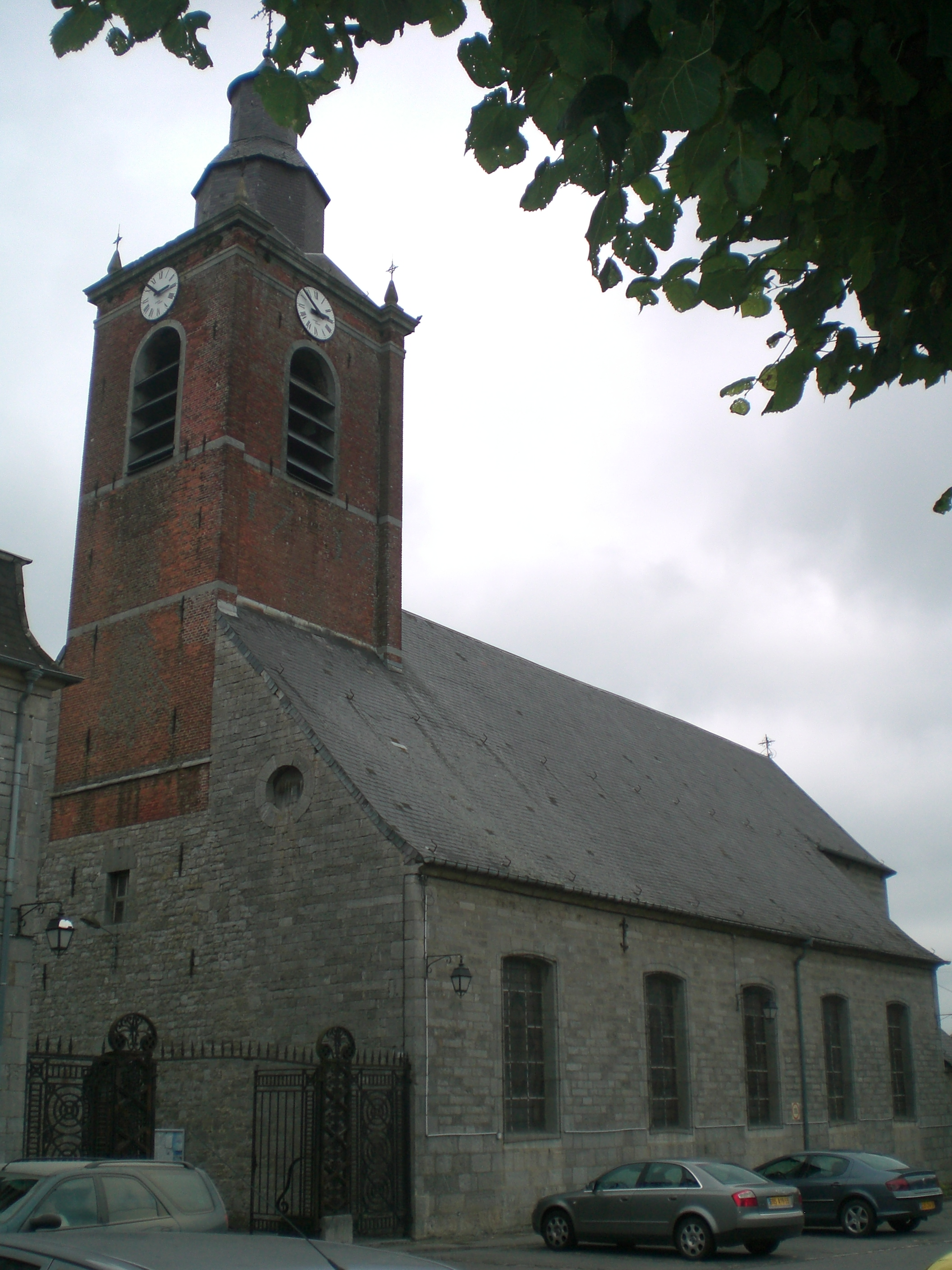 eglise de Glageon (Nord) france